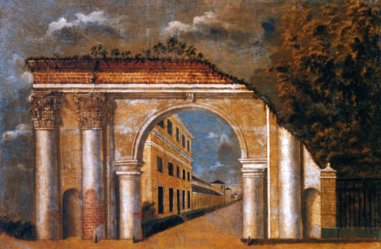 Руинные ворота в Архангельском